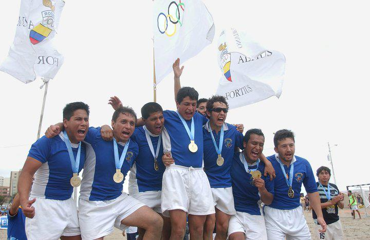 Festival Olimpico